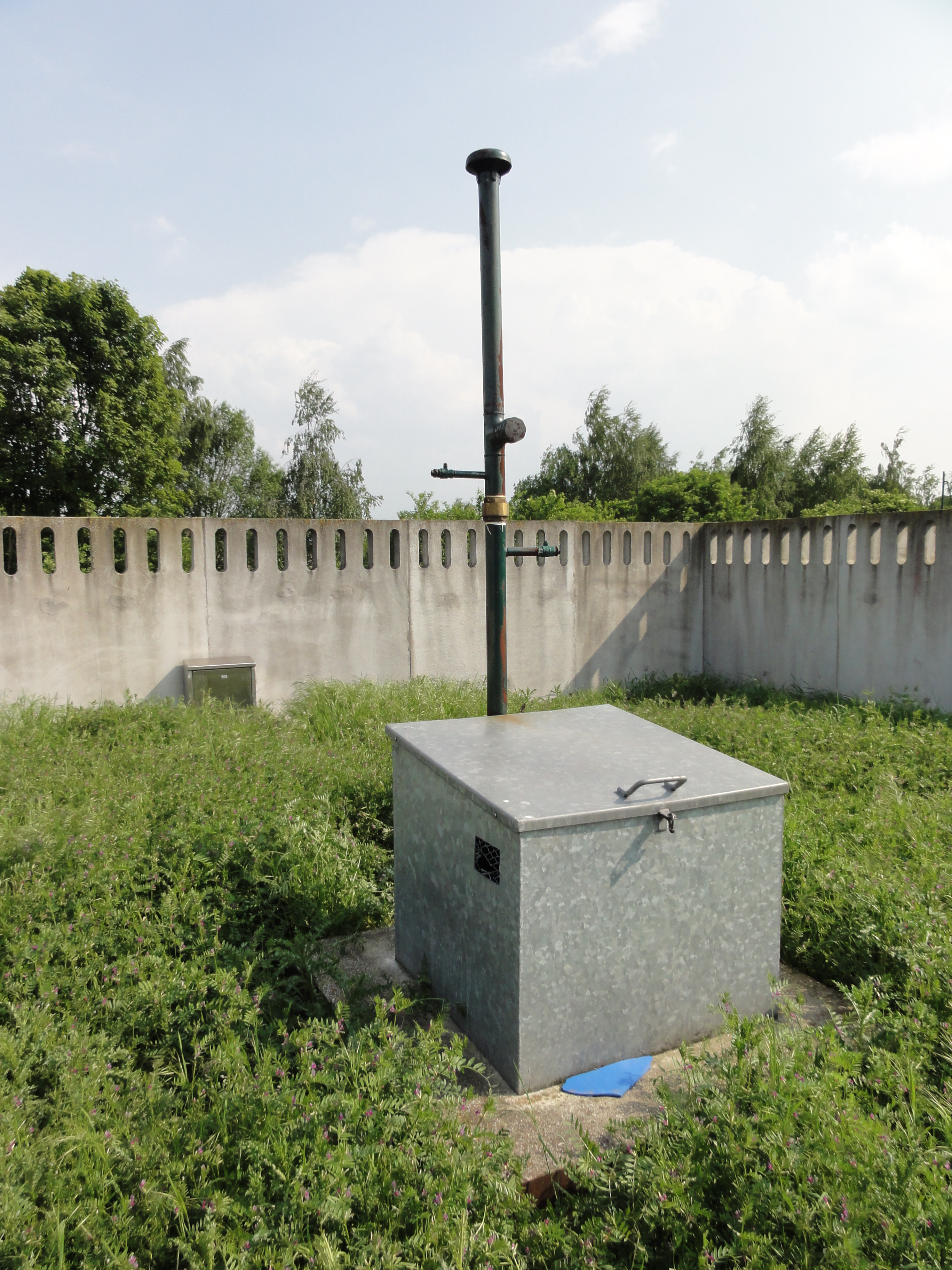 La Fosse Saint Pierre de la Compagnie des mines d'Anzin était un charbonnage constitué d'un seul puits situé à Valenciennes, Nord, Nord-Pas-de-Calais, France.